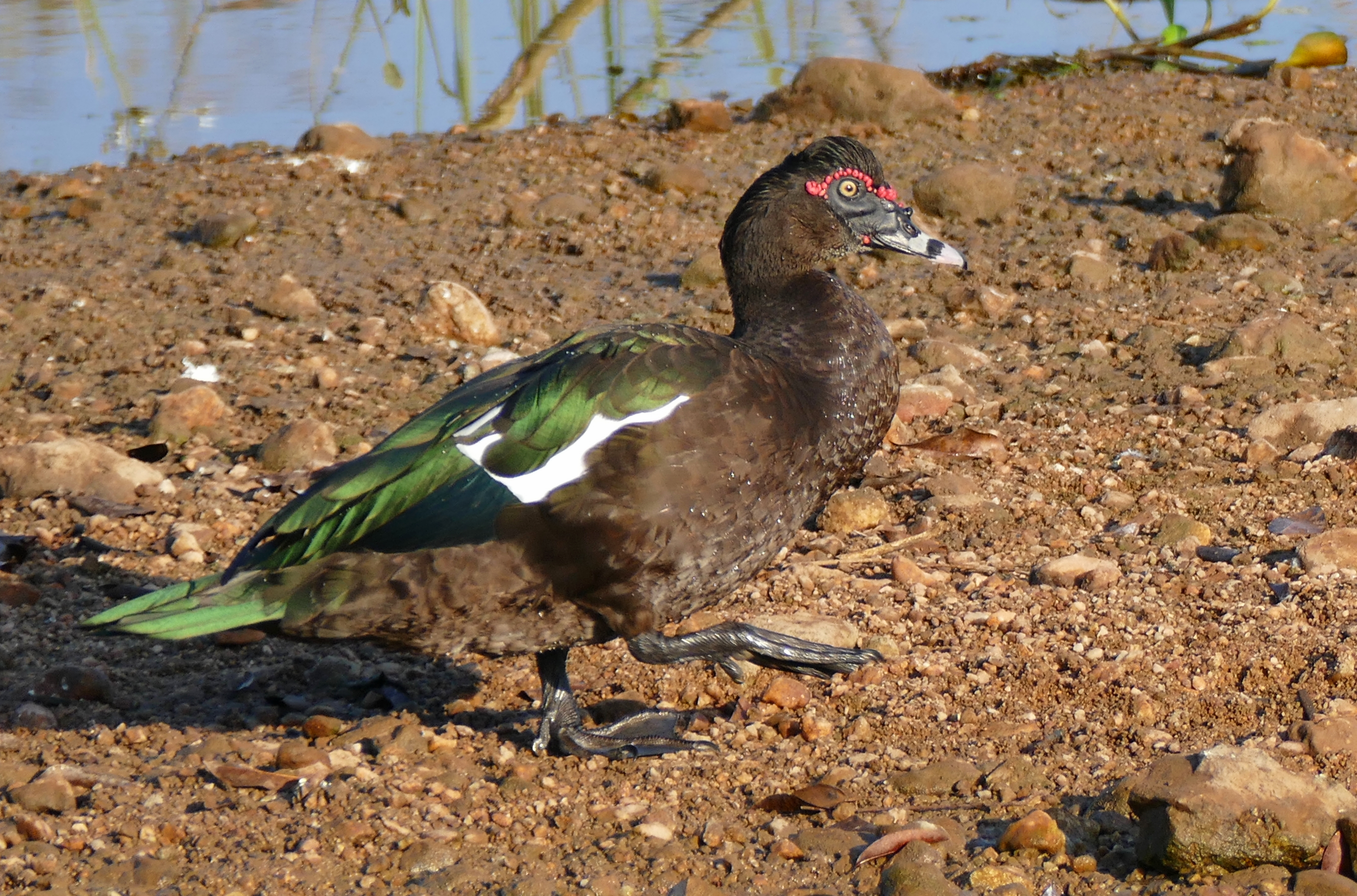 Transpantaneira, Poconé, Mato Grosso, BRAZIL